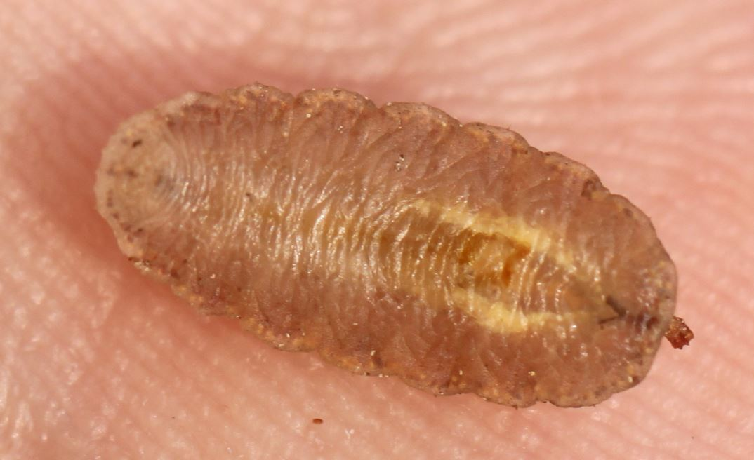 Ventralseite einer Dipterenlarve, Epistrophe cf eligans, am 7. August 2018